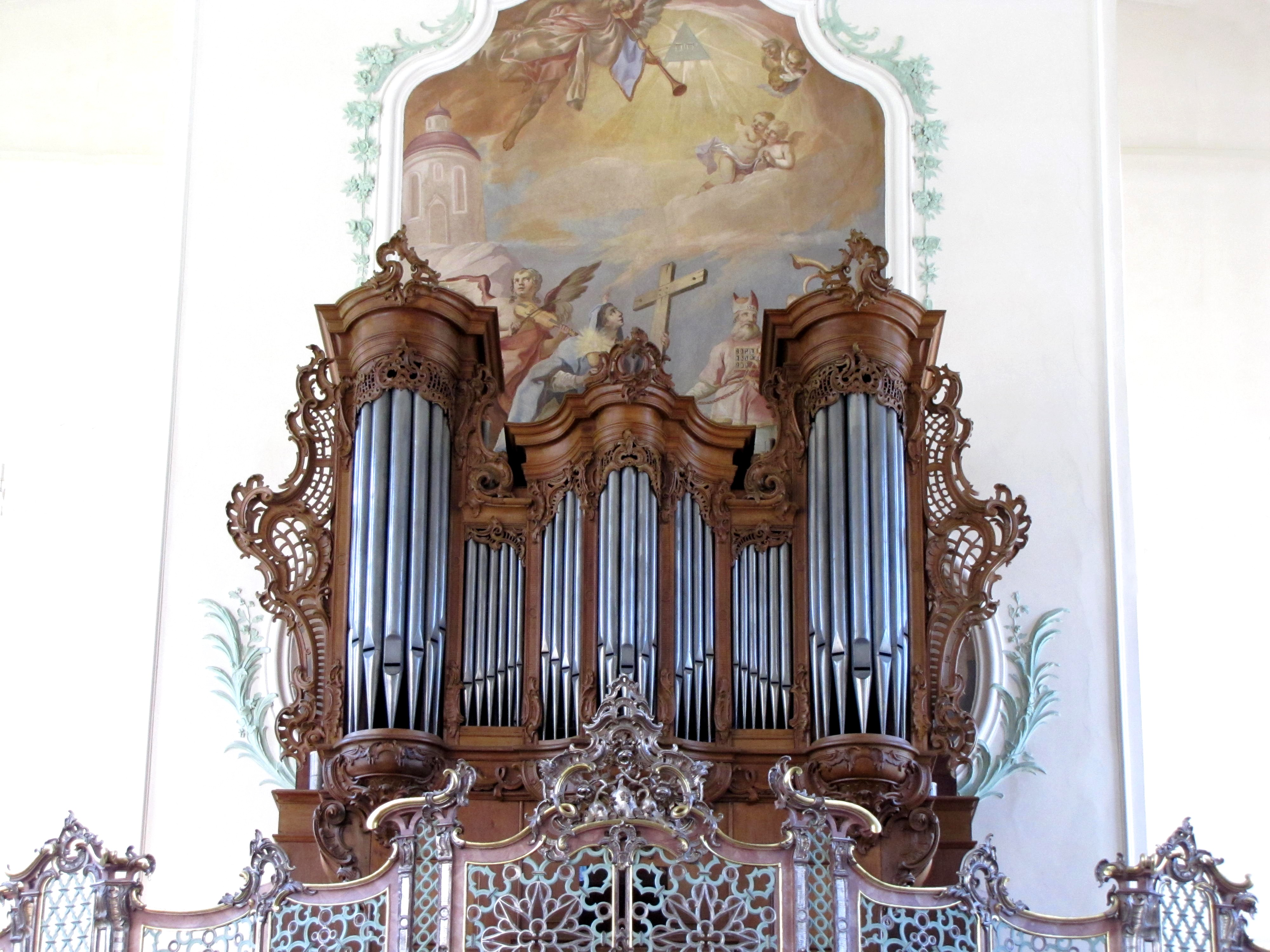 Baden-Württemberg, Ettenheimmünster, Pfarrkirche (Wallfahrtskirche) St. Landelin, Johann Andreas Silbermann Orgel (1769)